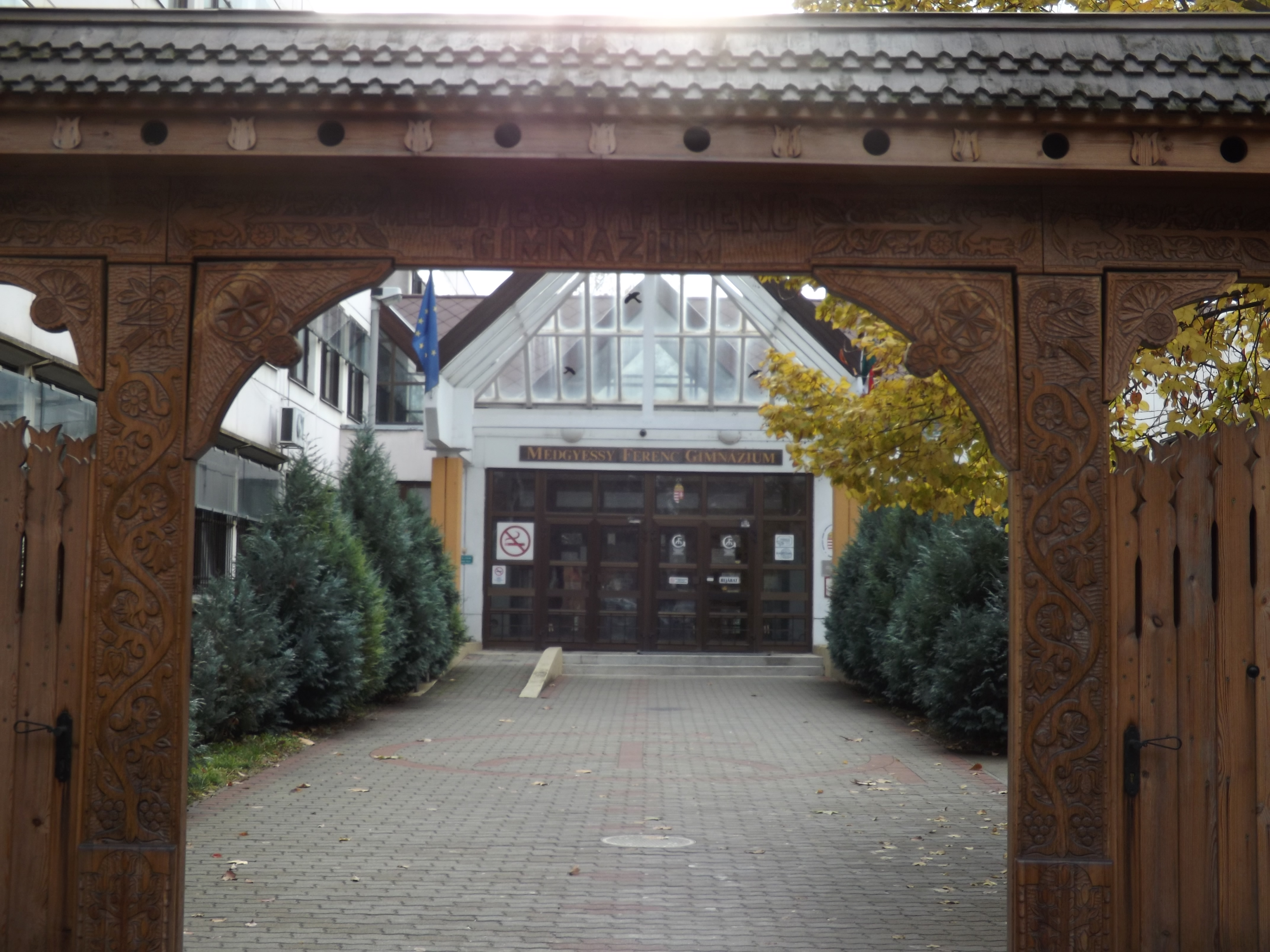 Debrecen, Tócóskert, a Medgyessy Ferenc Gimnázium bejáratának kapuja